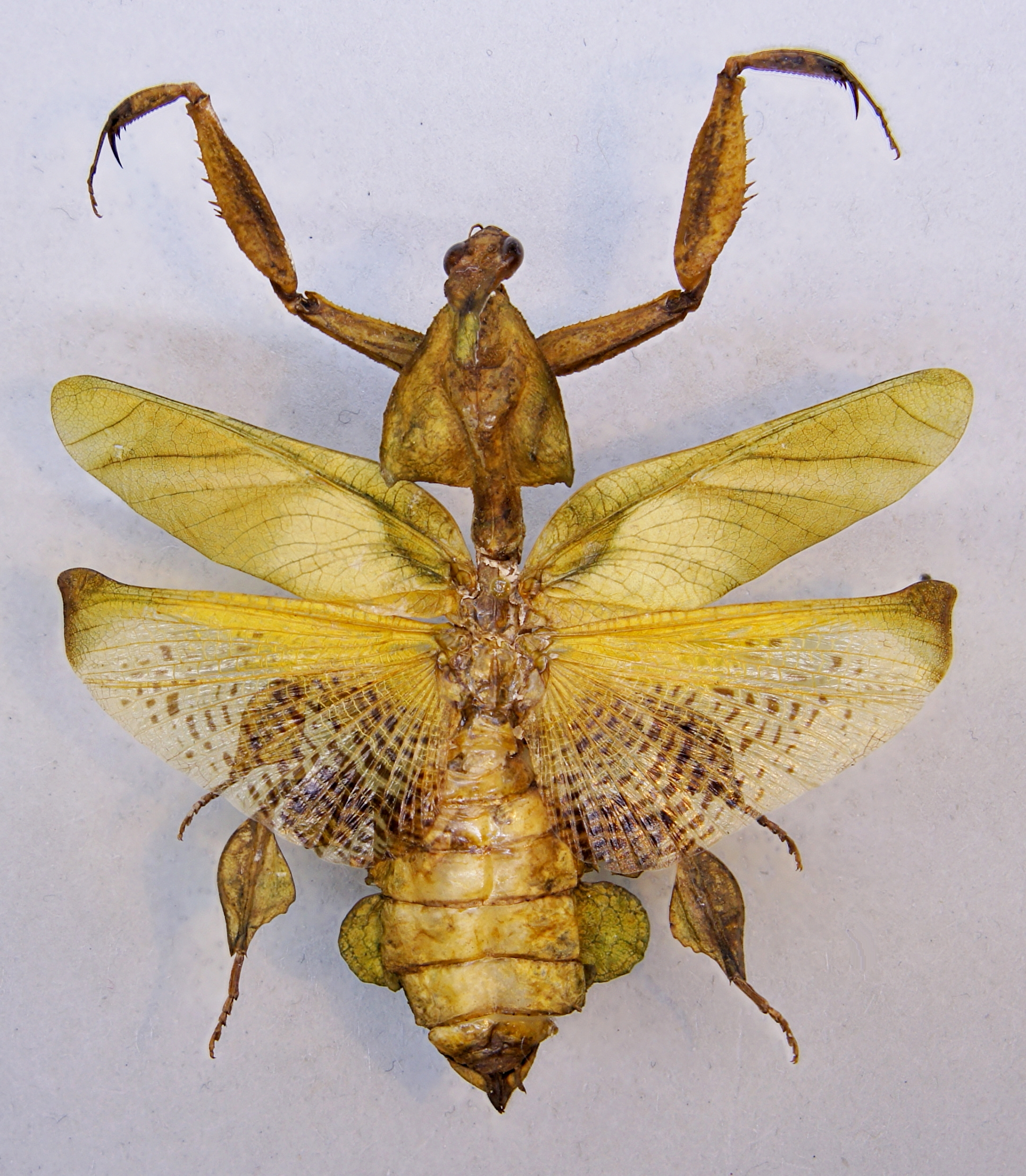 Phyllocrania paradoxa (Burmeister, 1838) ♀ Herkunft: Kenia, Kilifi